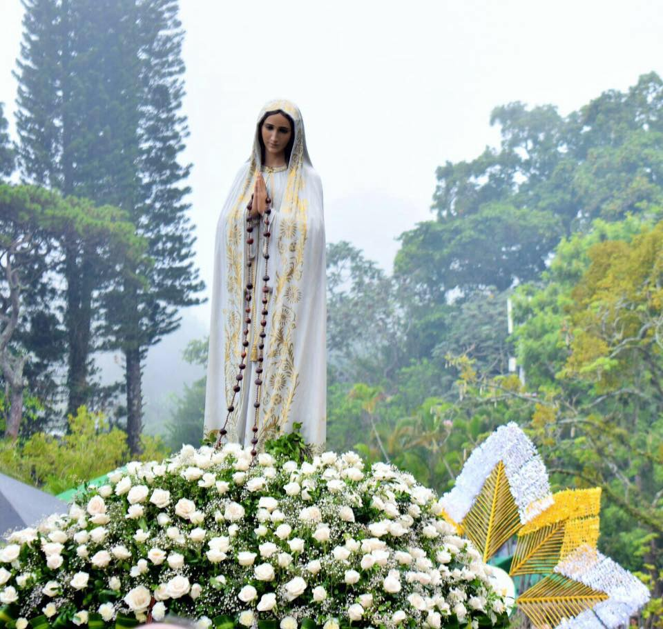 Procesión de las Palmas en honor a la Virgen de Fatima Planes de Renderos